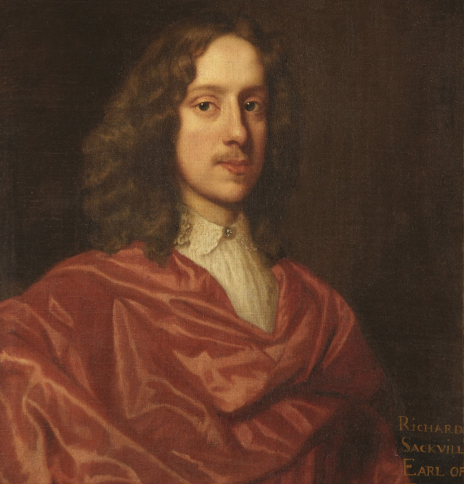 Lord Dorset